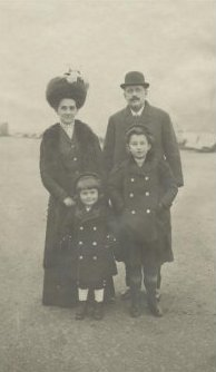 Just Sándor feleségével, és két legidősebb gyermekükkel.